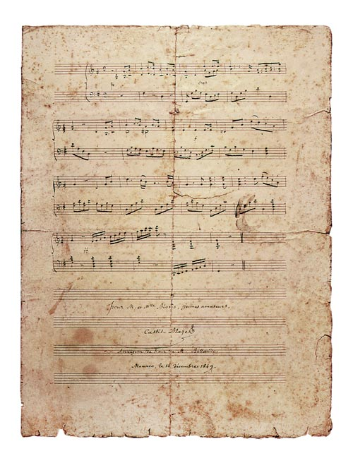 Partition manuscrite Hymne monégasque (Théophile Bellando de Castro - Castil-Blaze)